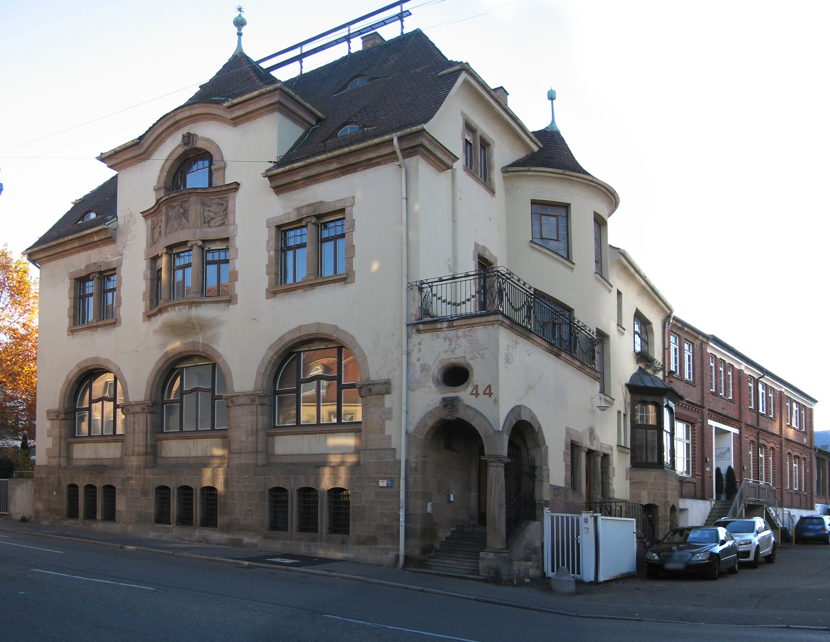 Martin-Luther-Straße 44 Ludwigsburg